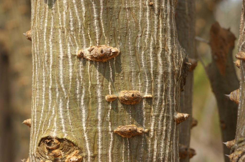 Erythrina velutina Willd. - FABACEAE - Jardim Botânico de Brasília - Distrito Federal - Brasil.